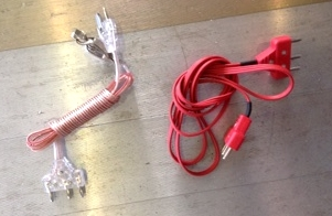 Gwifren corff cleddyfa